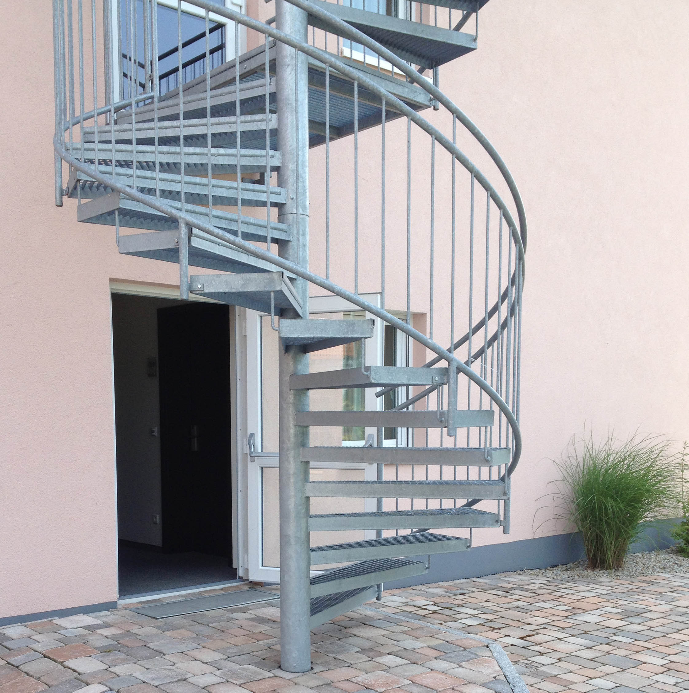 Feuerverzinkte Wendeltreppe